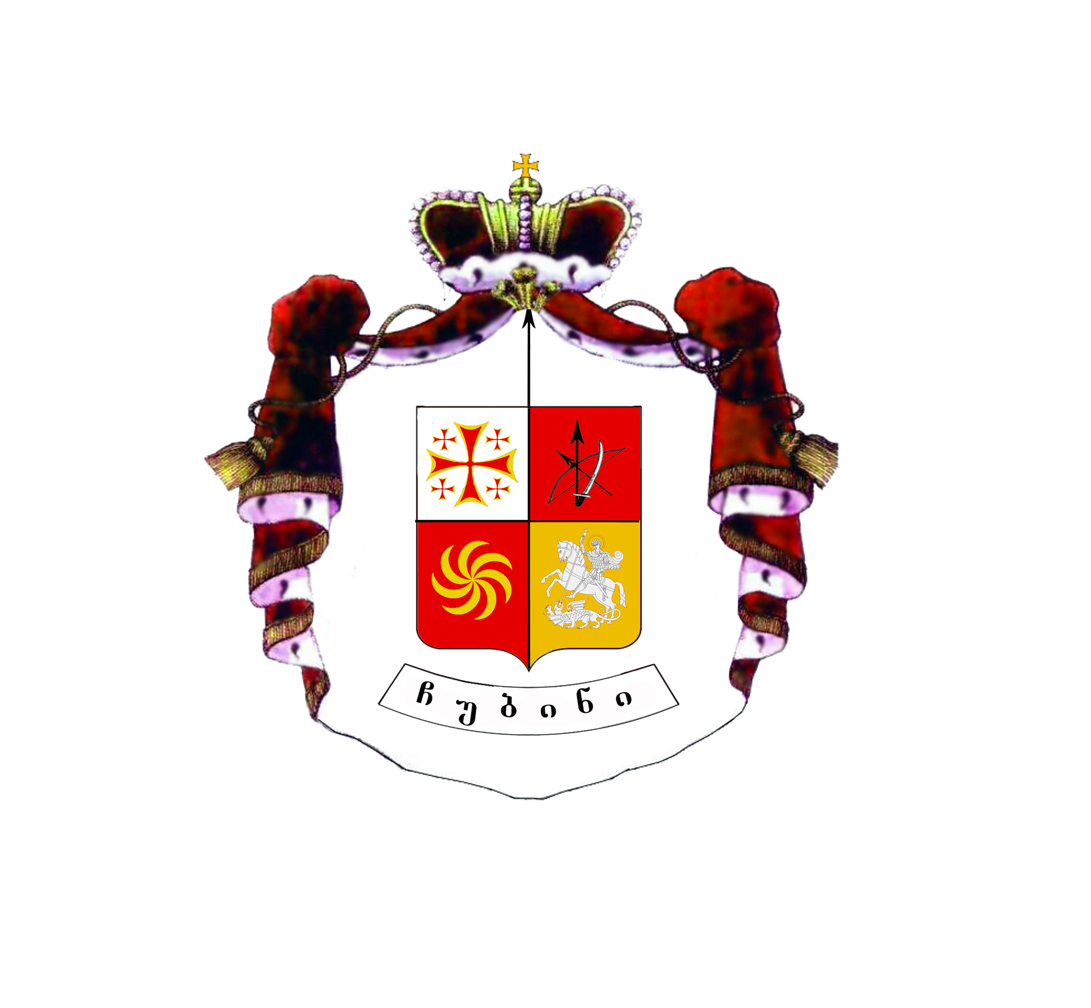 ჩუბინიძეების საგვარეულო გერბი